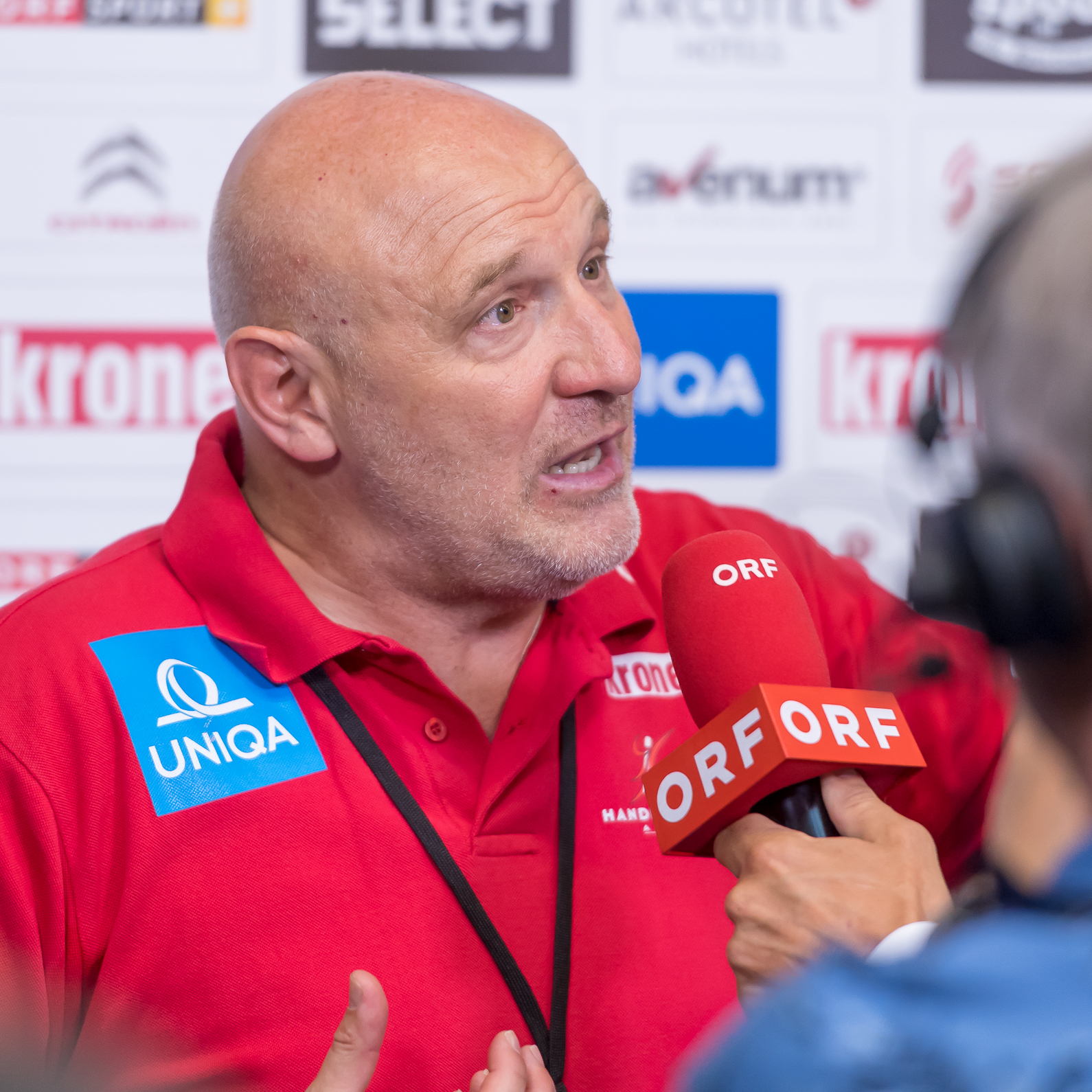 Damenhandball WM-Qualifikation Playoff Österreich vs Rumänien am 13. Juni 2017 in Stockerau. Bild zeigt Coach Herbert Müller (AUT).